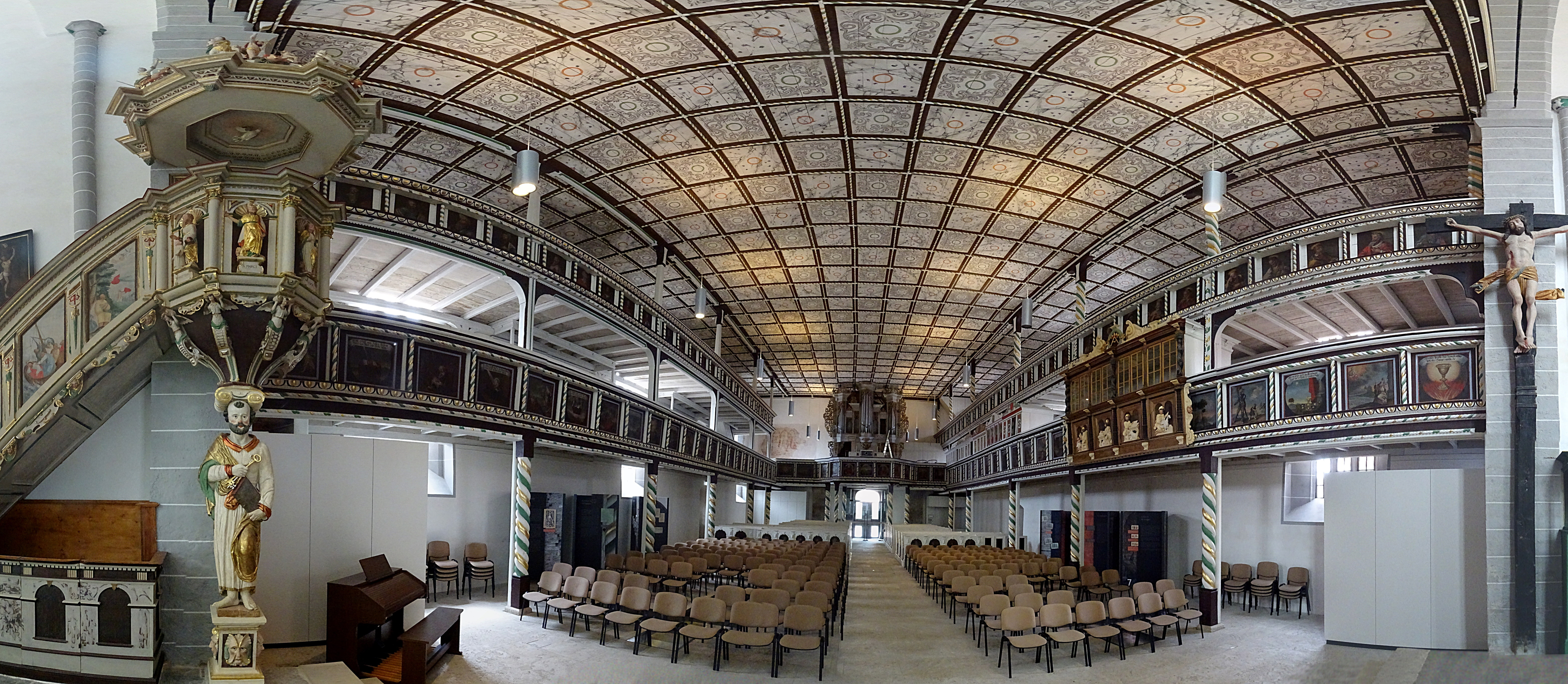 Innenraum Panorama der Stadtkirche St. Peter und Paul (Weißensee), Blick zur Orgel